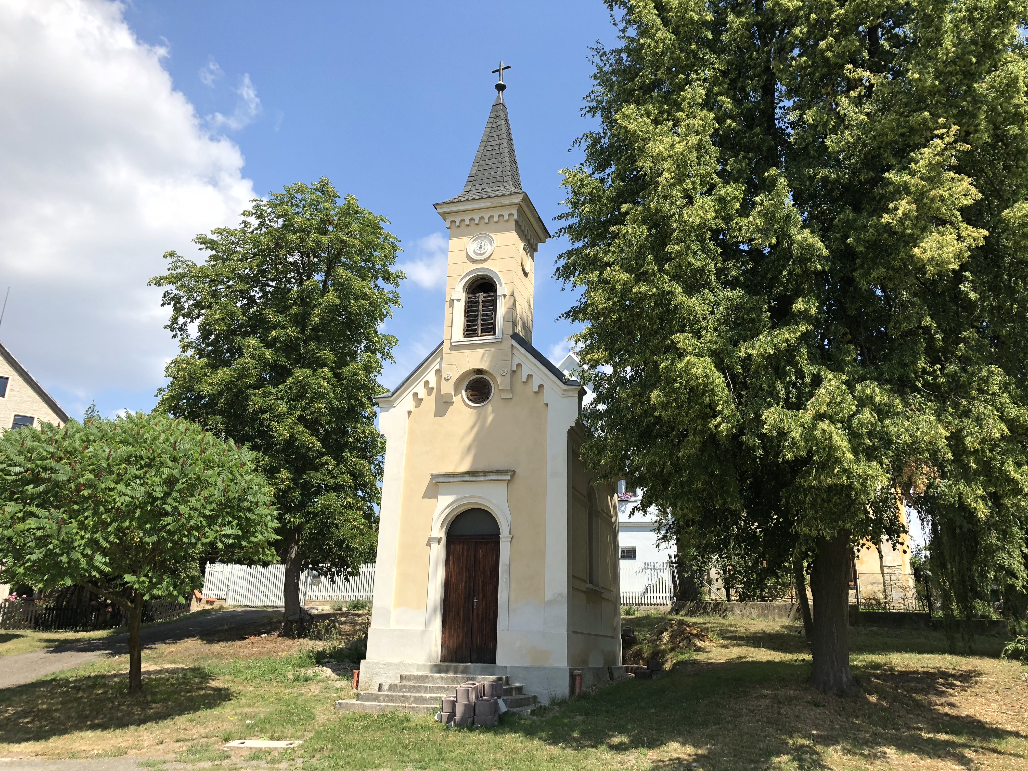 Horní Řepčice, kaple